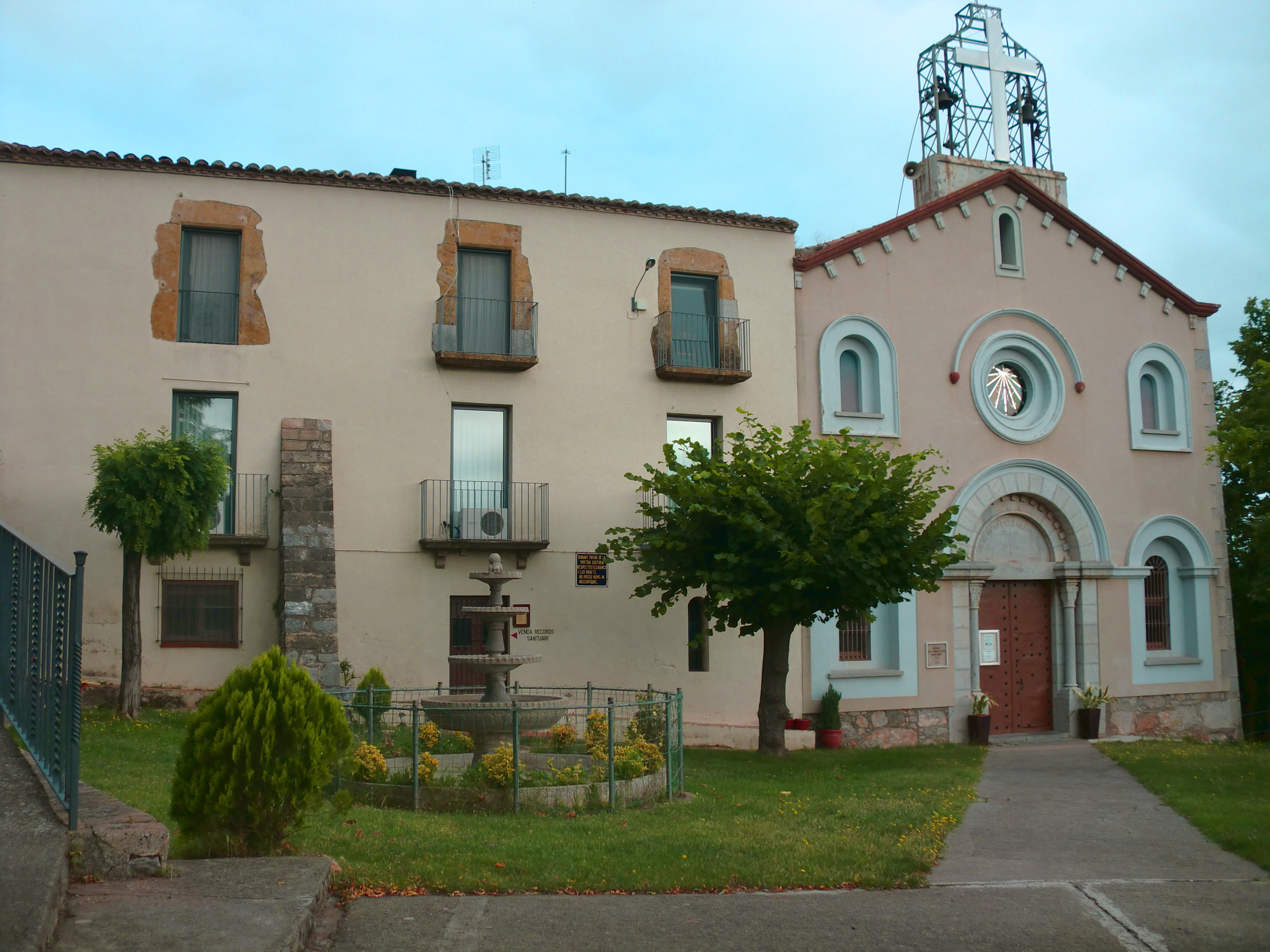 Santuari de la Mare de Déu de la Salut de Terrades, església i hostatgeria